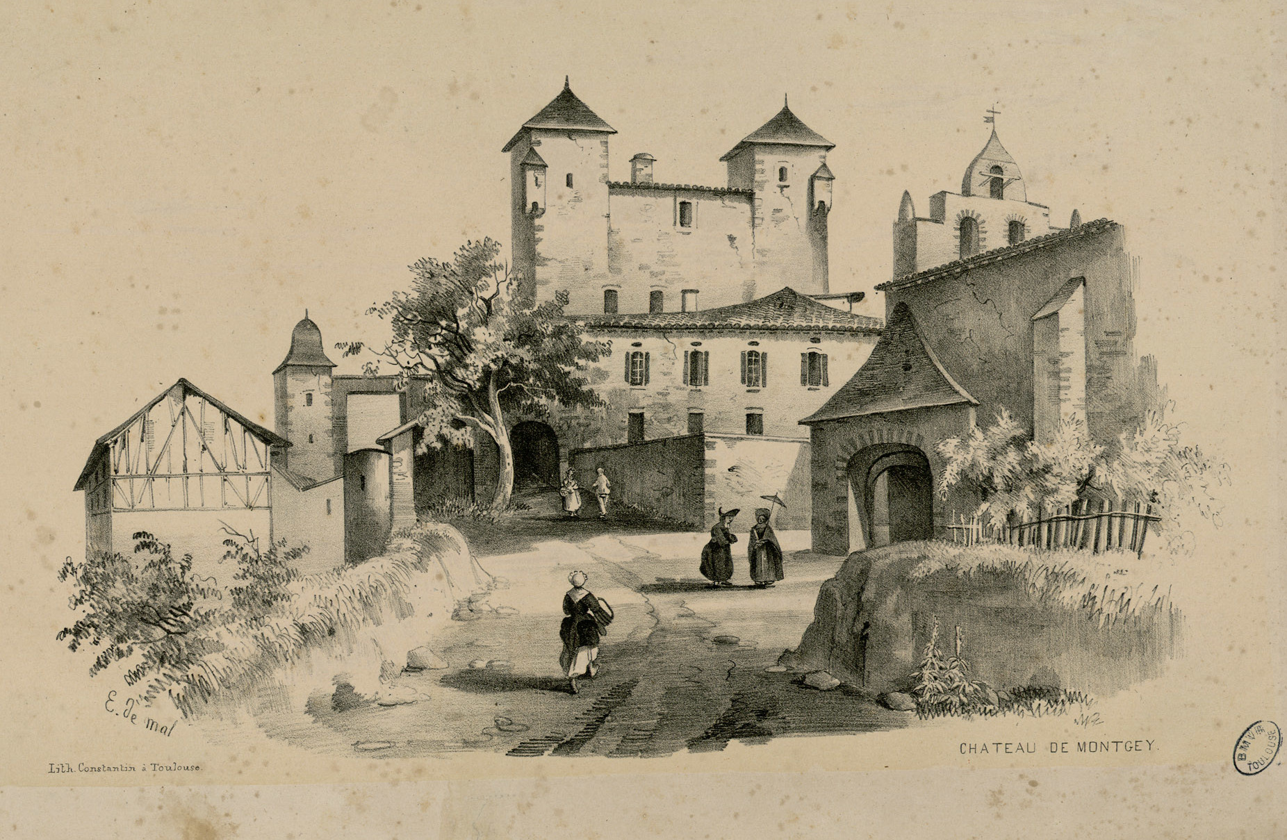 Fait partie d'un recueil de 23 planches lithographiées en camaïeu Ancely, René (1876 - 1966). Possesseur